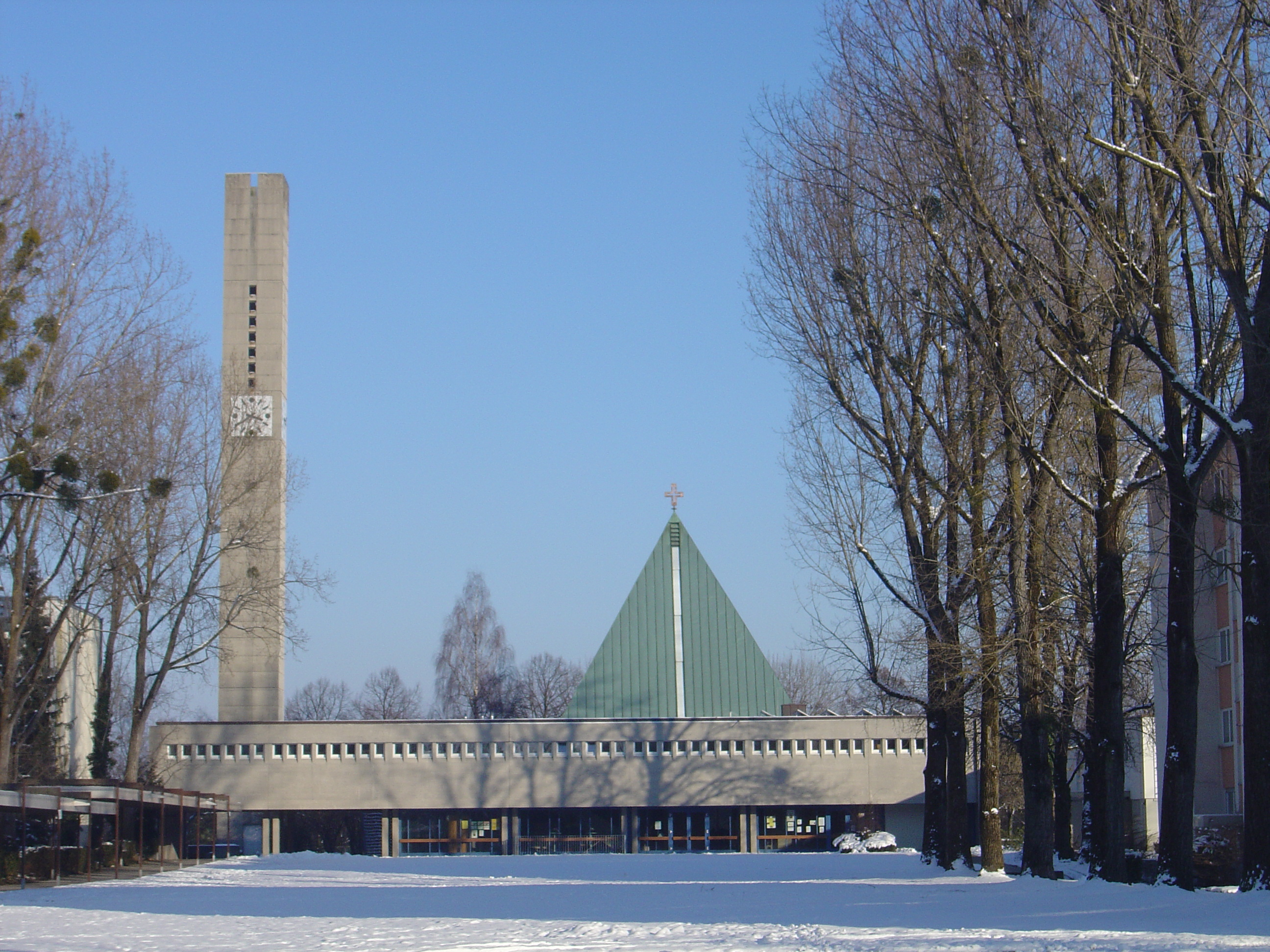 Kapernaumkirche München von Westen aus gesehen